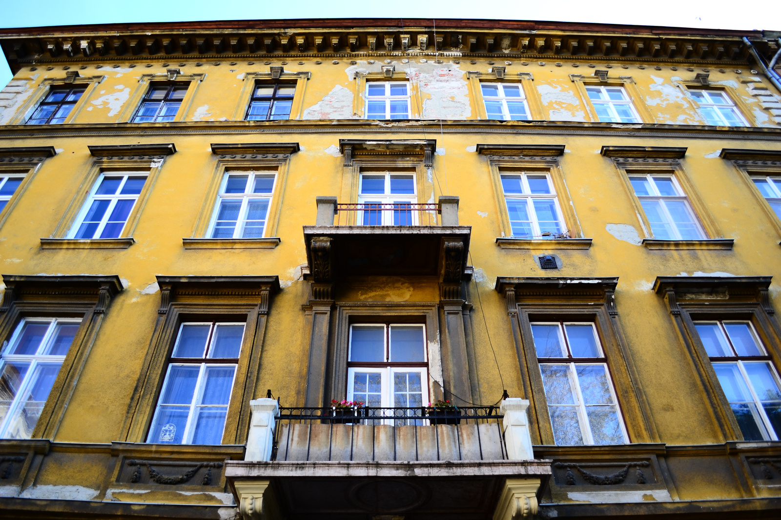 Lakóépület (Budapest, VII. kerület, Klauzál tér, 7.) This is a photo of a monument in Hungary, Identifier: 11550